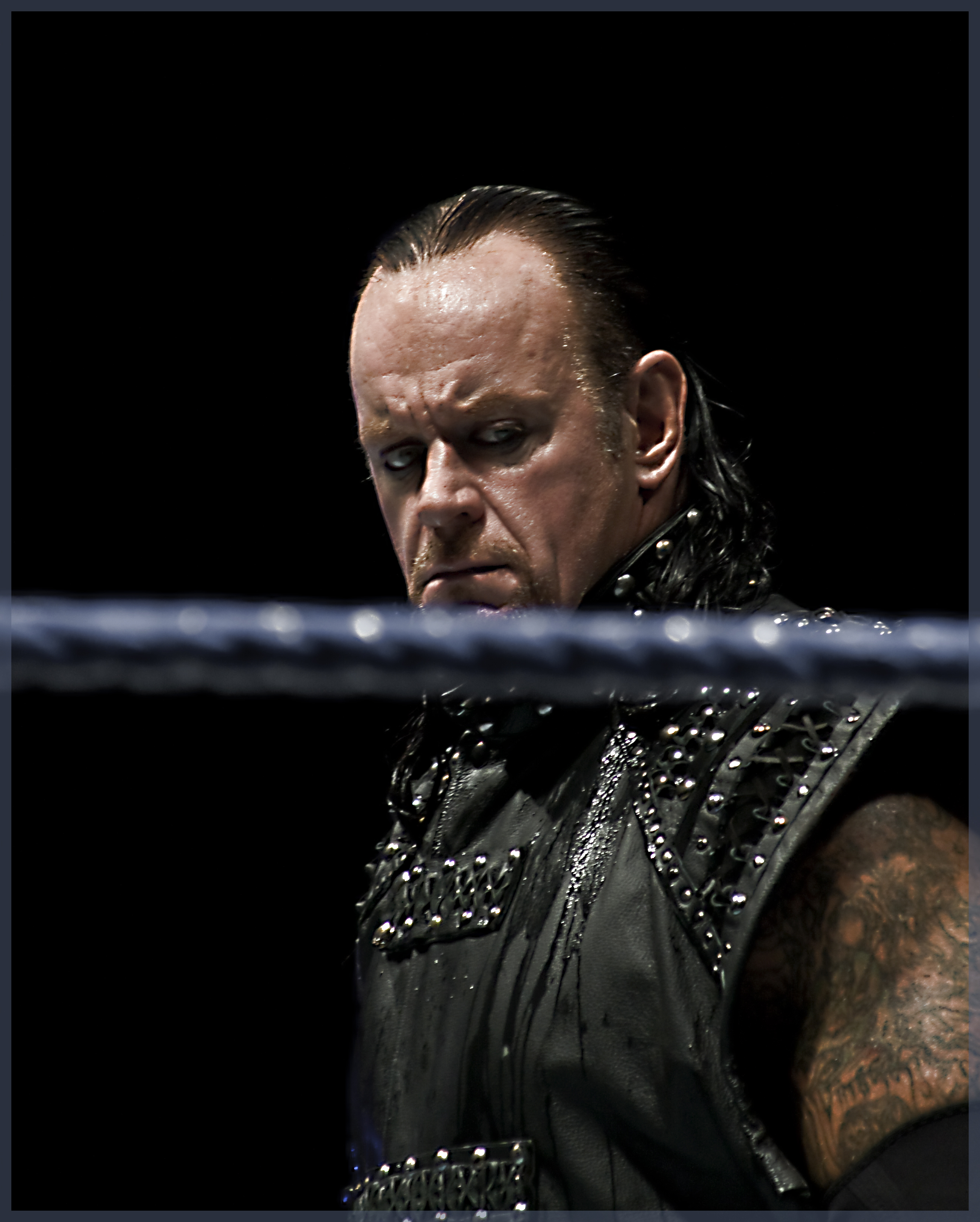 el luchador undertaker